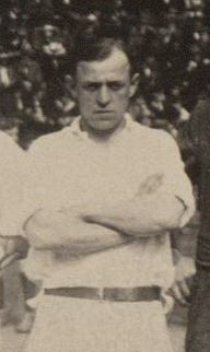 Henk Hordijk - was een Nederlands voetballer.